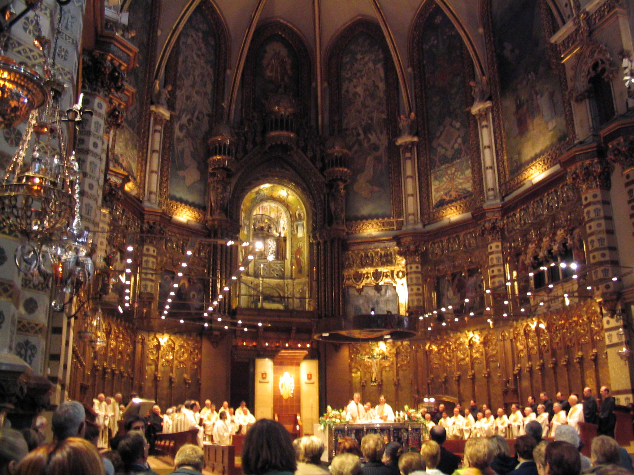 Missa al monestir de Montserrat 2006